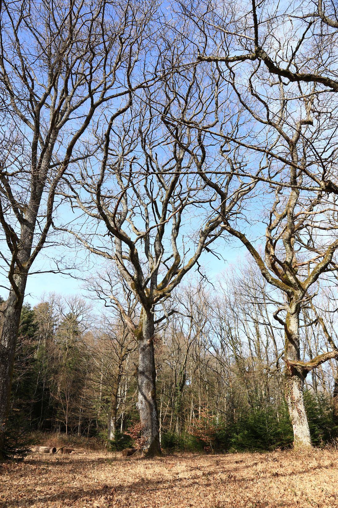 Un havre de paix, où les marcheurs se ressourcent.